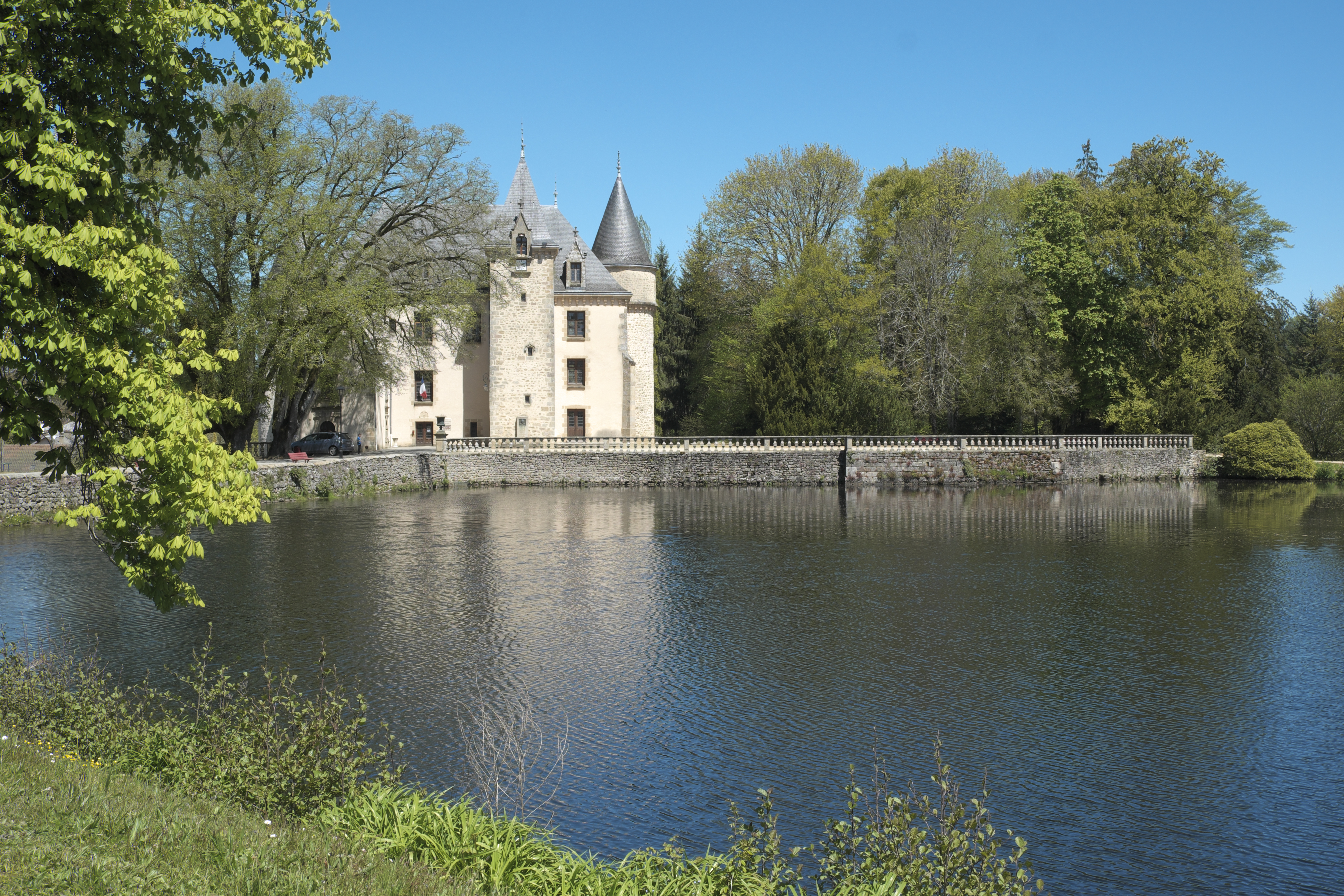 Schloss von Nieul im Département Haute-Vienne (Nouvelle-Aquitaine/Frankreich)